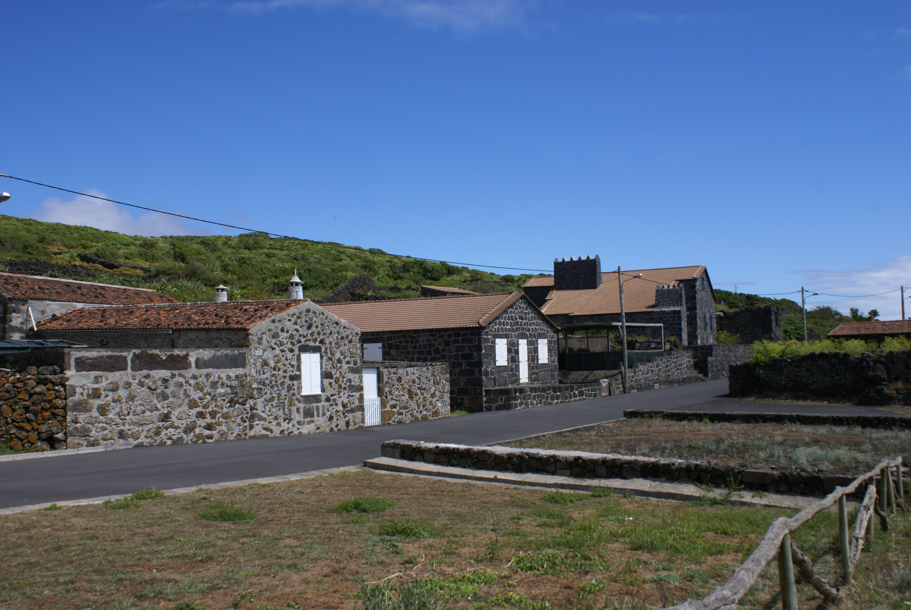 Fajã da Beira Mar, moradias tipicas, Santa Cruz da Graciosa, ilha Graciosa, Açores, Portugal